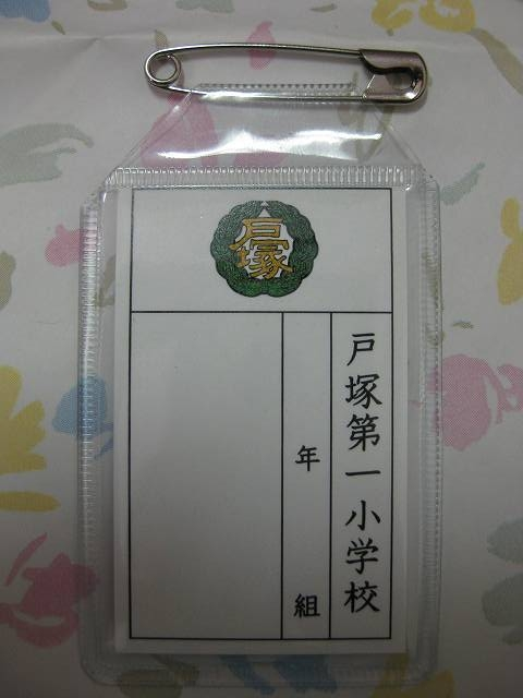 小学校の名札に多い形体。ビニール製のケースに、紙製の記名部を挿入したもの。（布製の記名部ではない。）